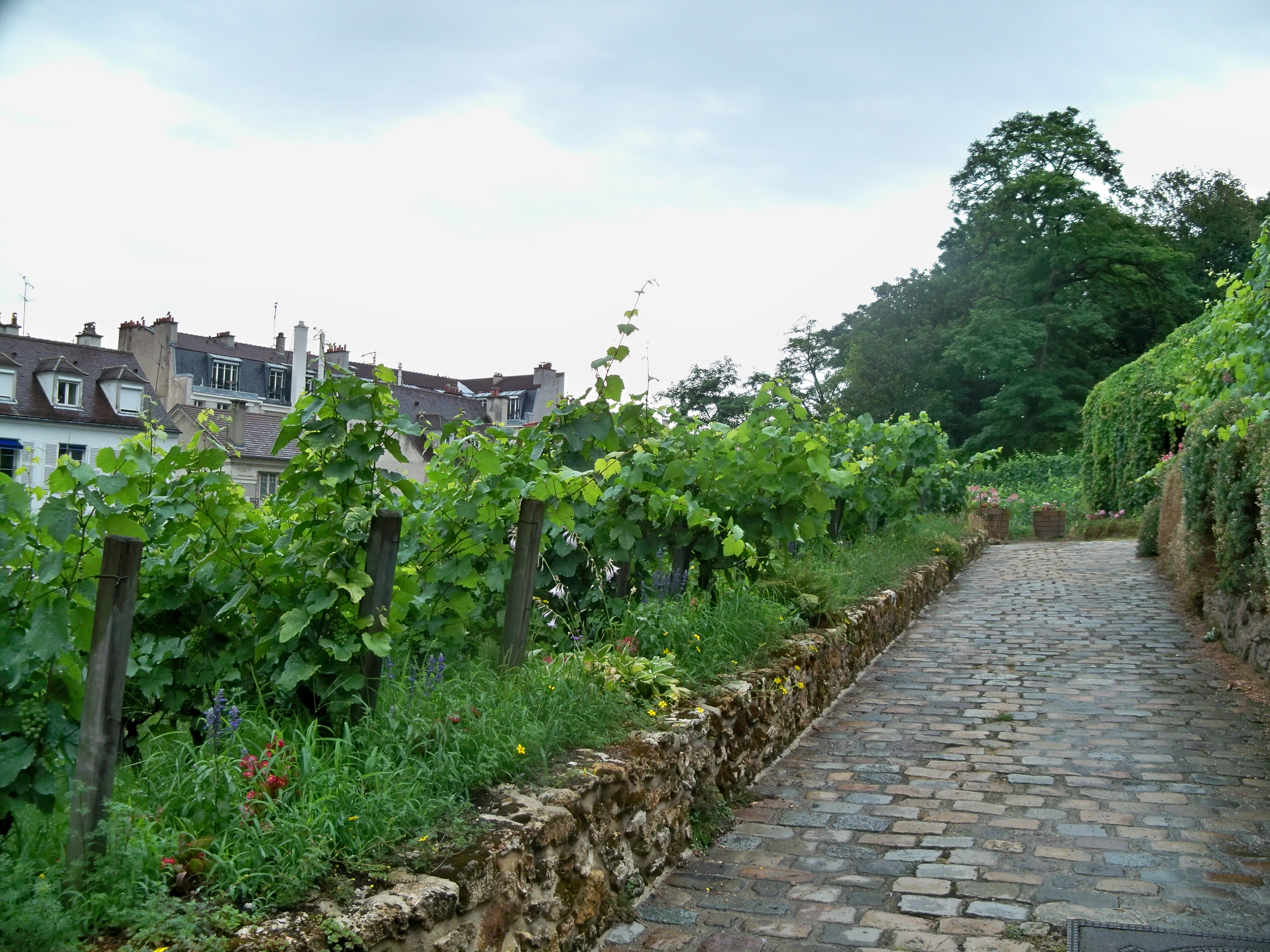 Vignoble à Montmartre, Paris